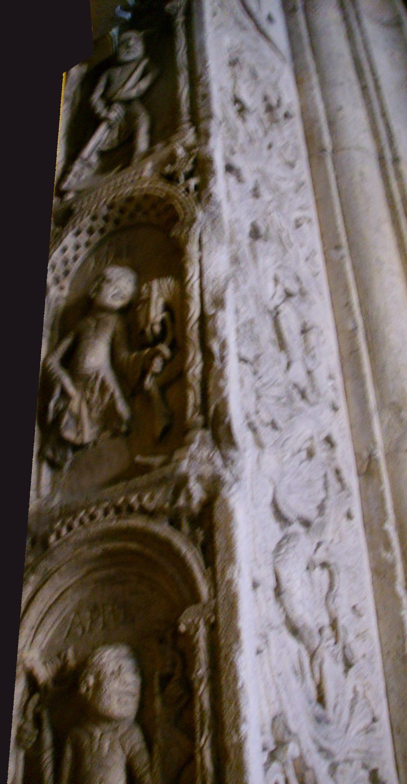 duomo di modena